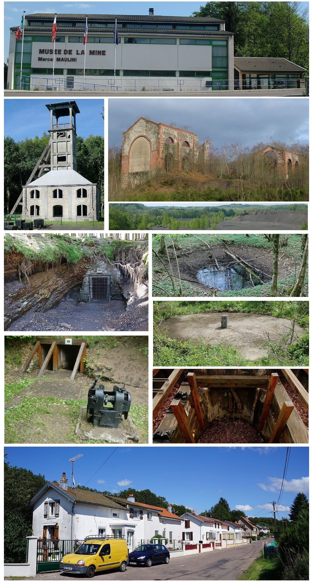 Montage de plusieurs photographies du bassin minier de Ronchamp